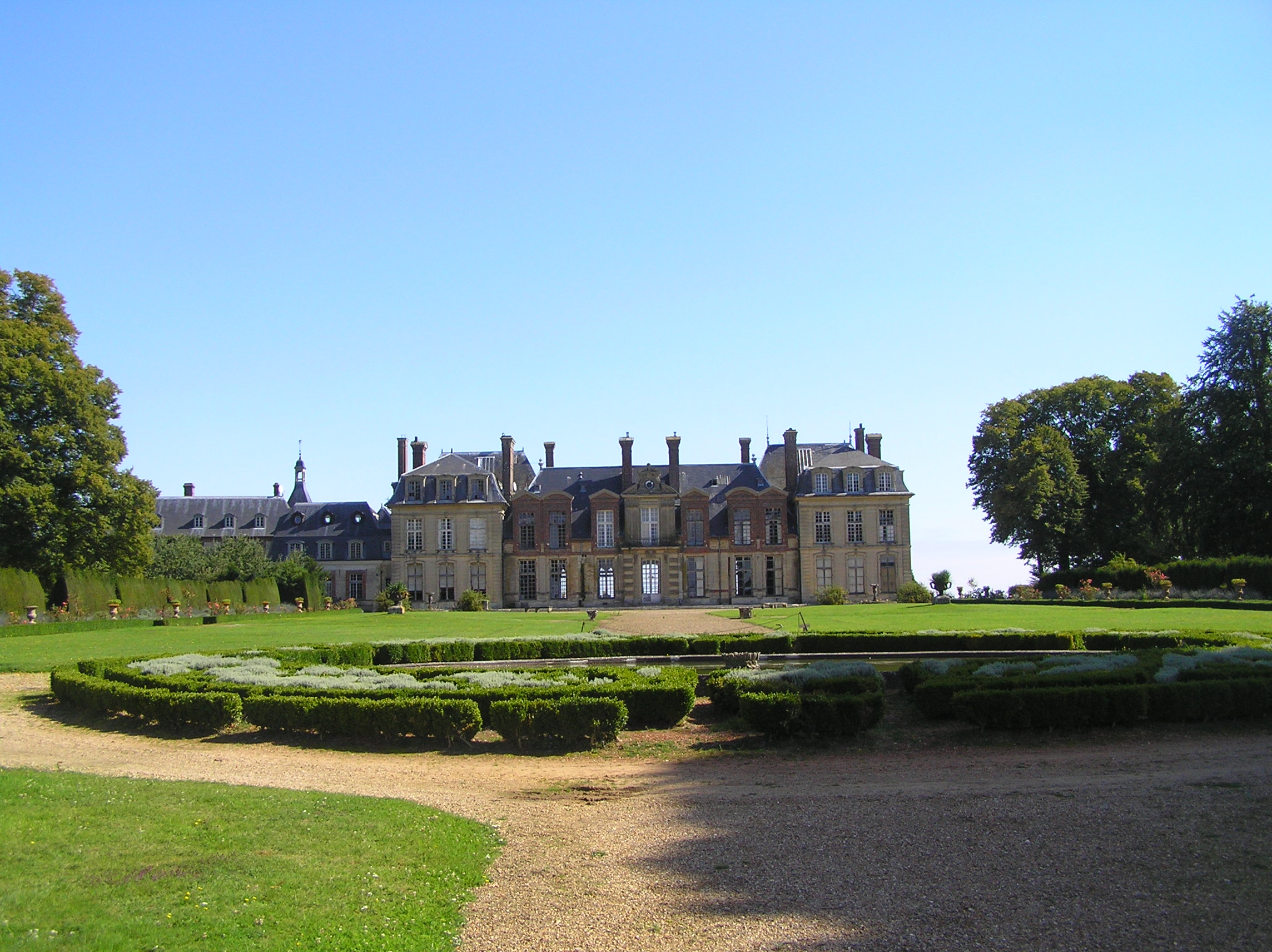 Le château de Thoiry, Yvelines, France